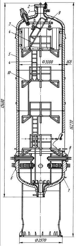 Конструкция КД ВВЭР-1000